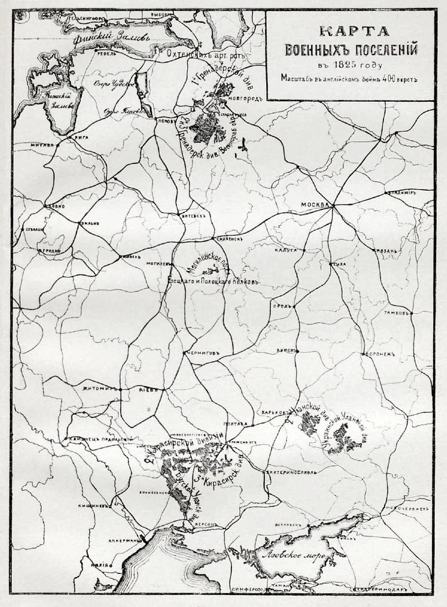 Данное изображение было использовано в статье «Военные поселения» опубликованной в шестом томе «Военной энциклопедии», который был издан книгоиздательским товариществом Ивана Дмитриевича Сытина в 1912 году в столице Российской империи городе Санкт-Петербурге.